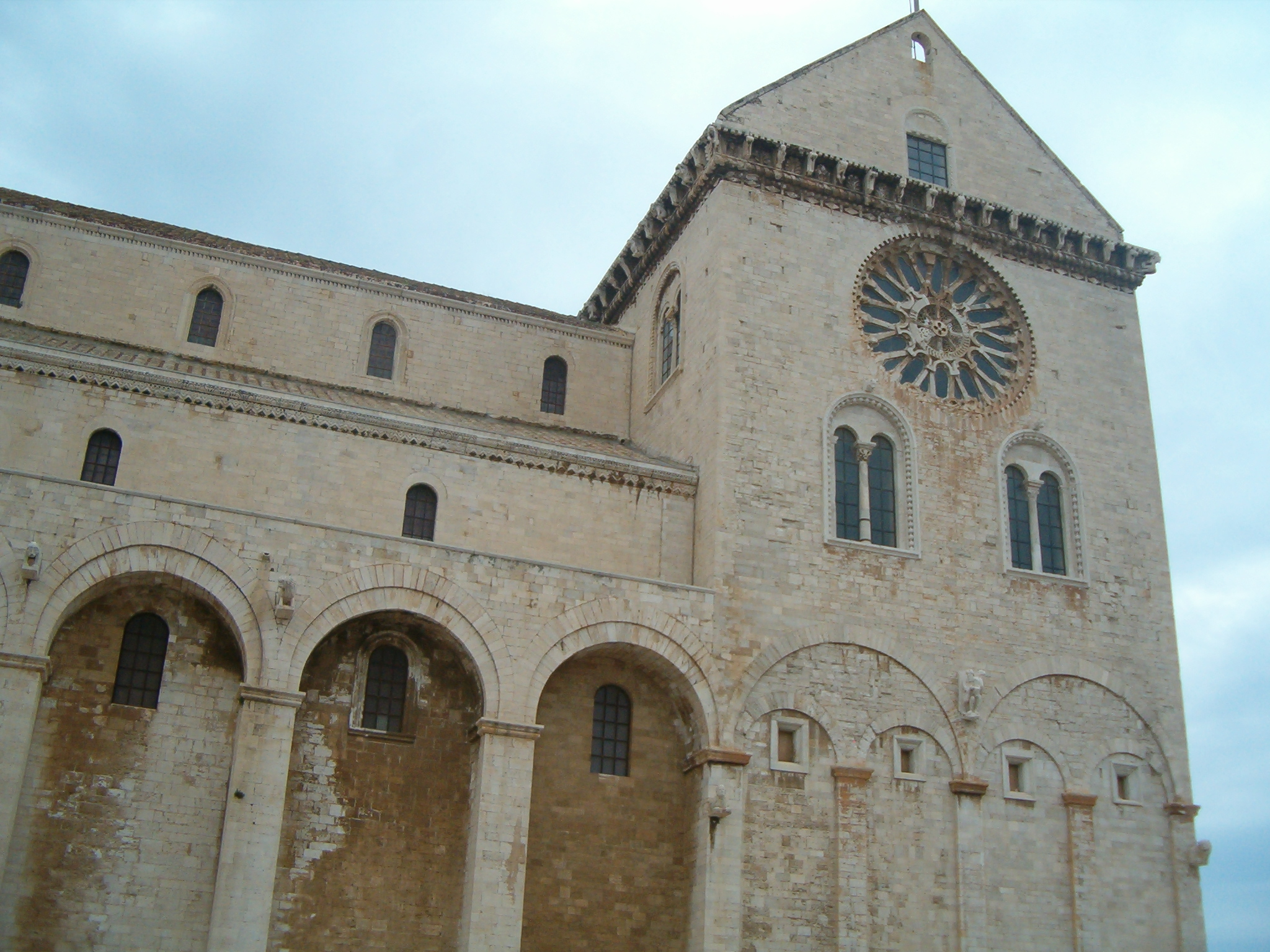 Cattedrale di Trani (Puglia, Italy), 1099 - 1143.